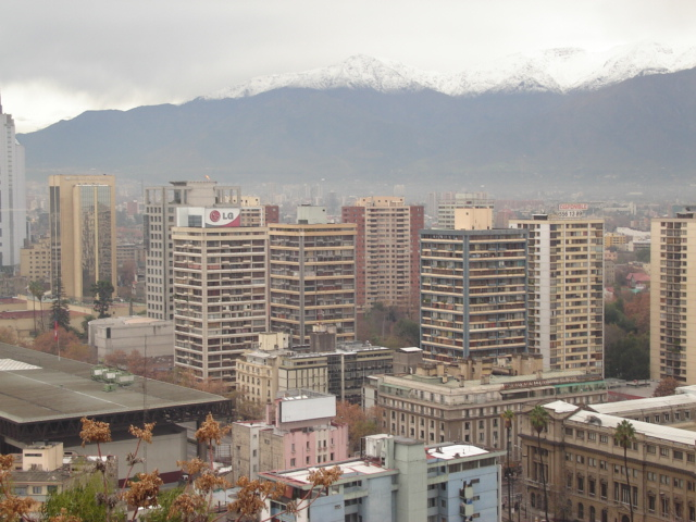 Santiago buildings, by Der schöne Tod. Any copyright is needed because it was taken by the owner. Image d'un quartier de Santiago, Chili. On a pas besoin de copyright à cause de que la photo était du propietère, Der schöne Tod Foto del las Torres San Borja en Santiago de Chile, tomada por Der schöne Tod